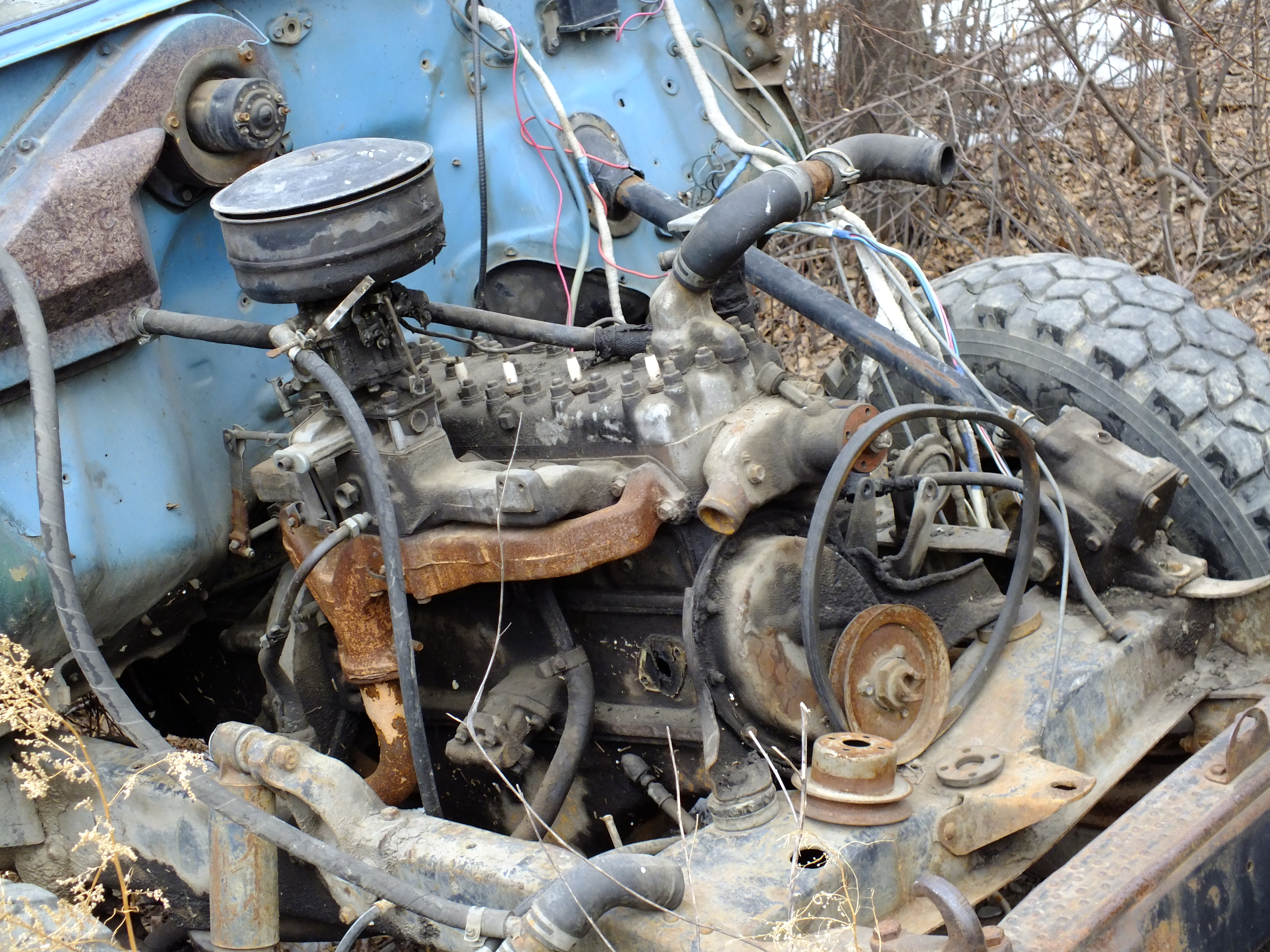 Старый ГАЗ-52